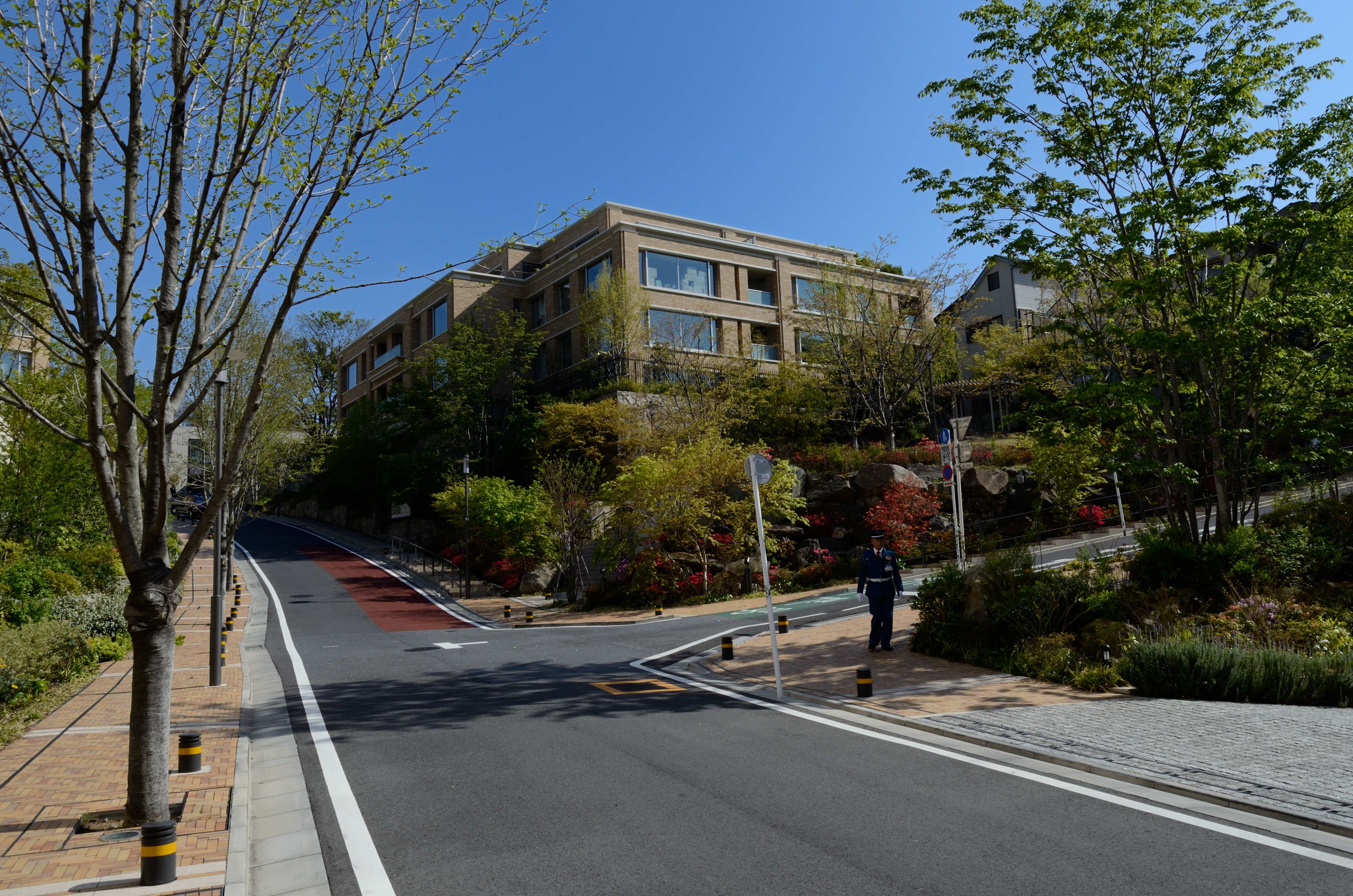 品川御殿山 Goten-yama, Shinagawa